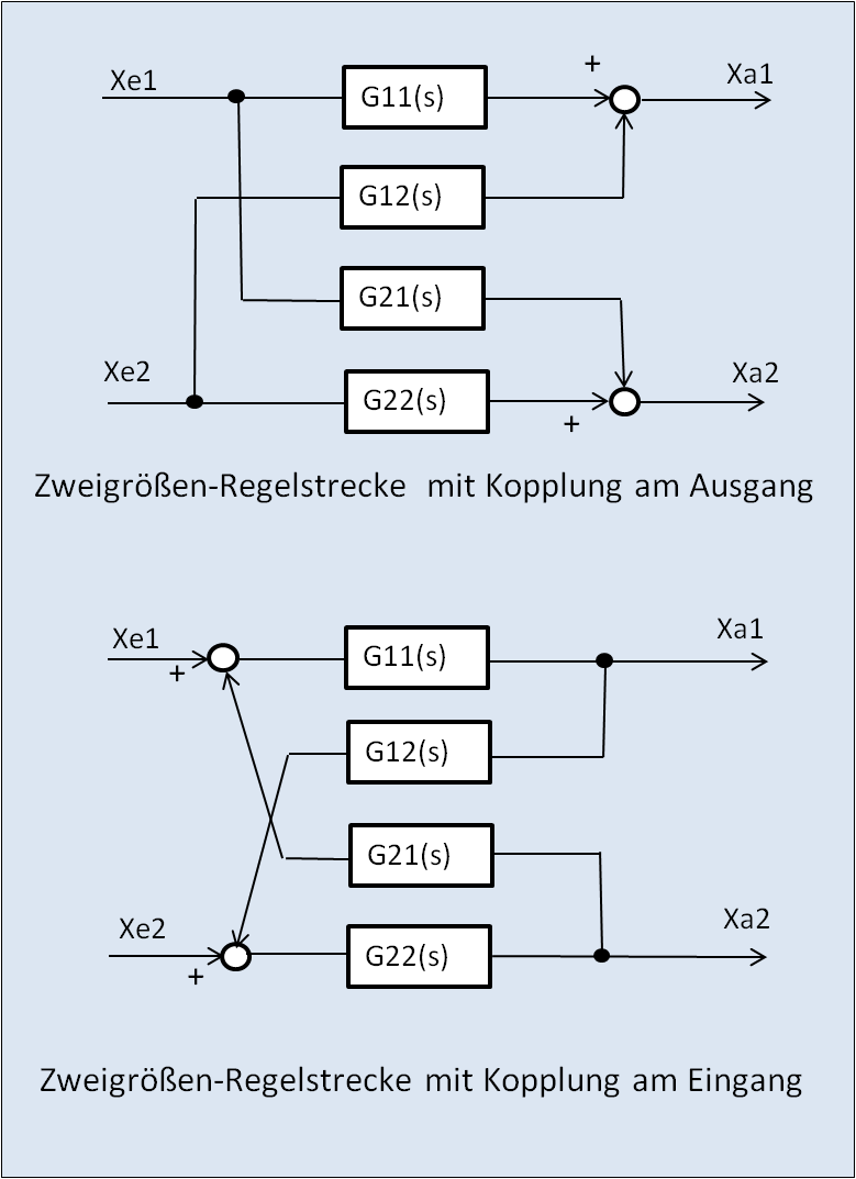 Zeigrößen-Regelstrecke